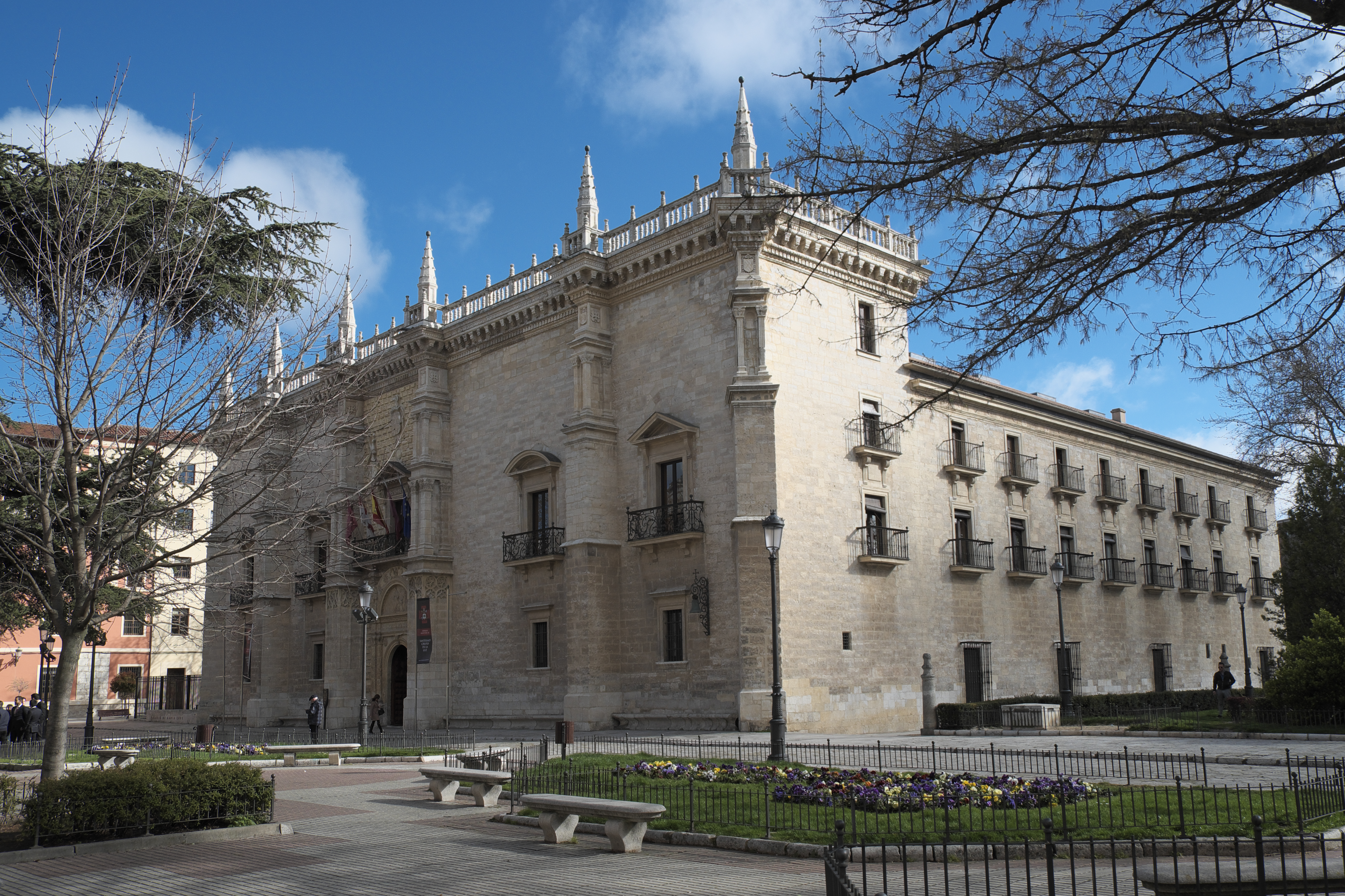 Palacio de Santa Cruz in Valladolid (Kastilien und León/Spanien)